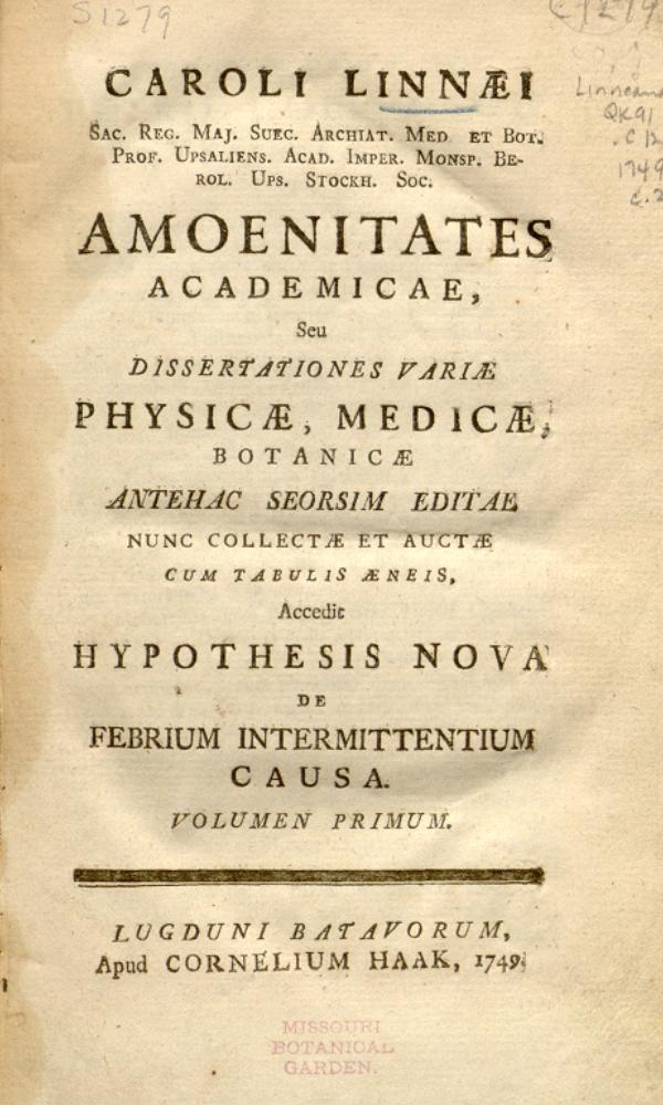 Titelblatt des ersten Bandes von Linnés Amoenitates Academicae